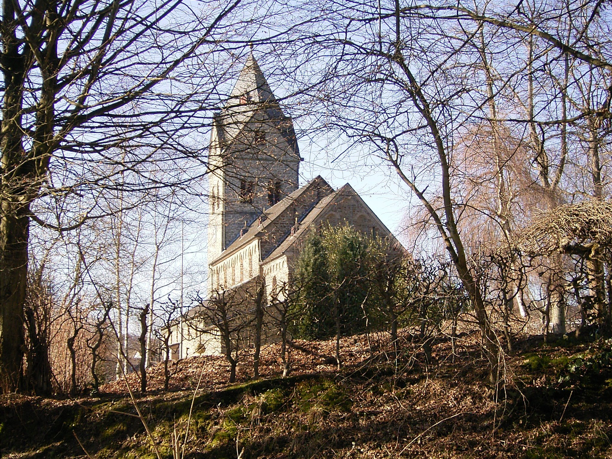 Sankt Gertrud in Morsbach